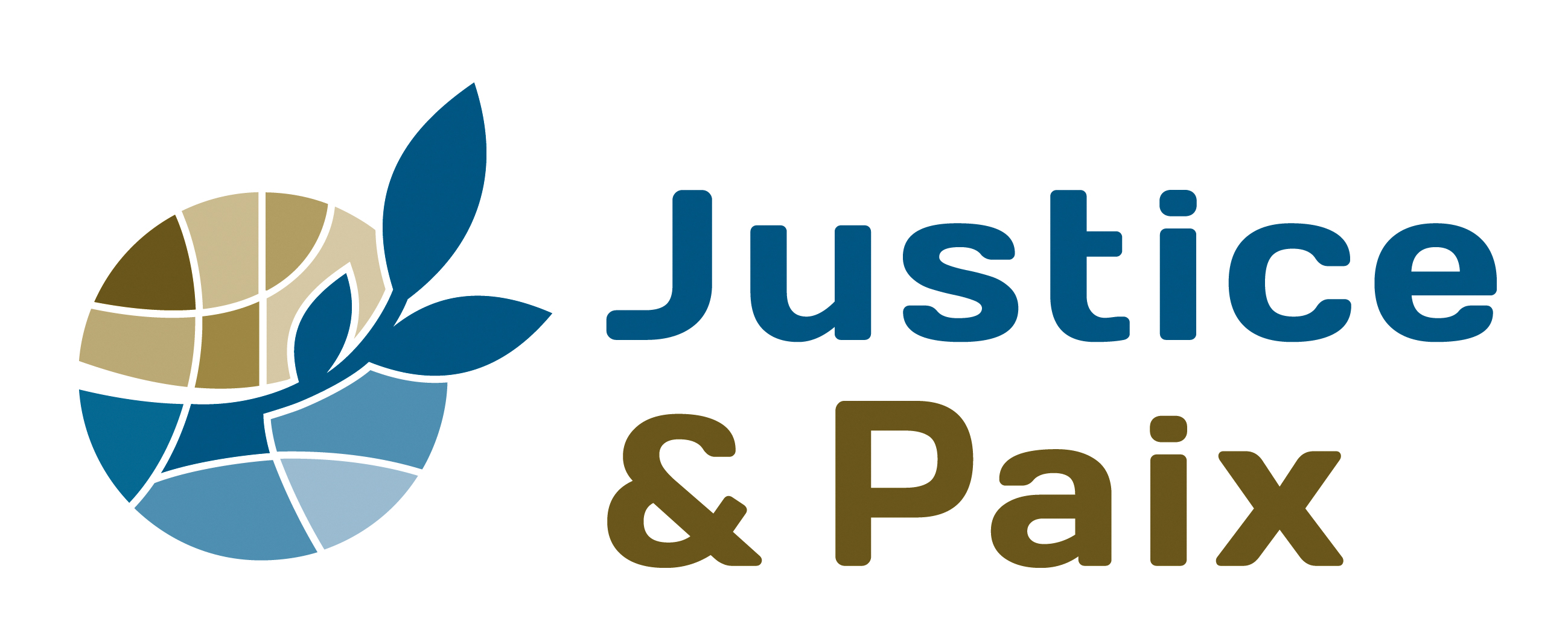 Logo de Justice et Paix, à partir de novembre 2017